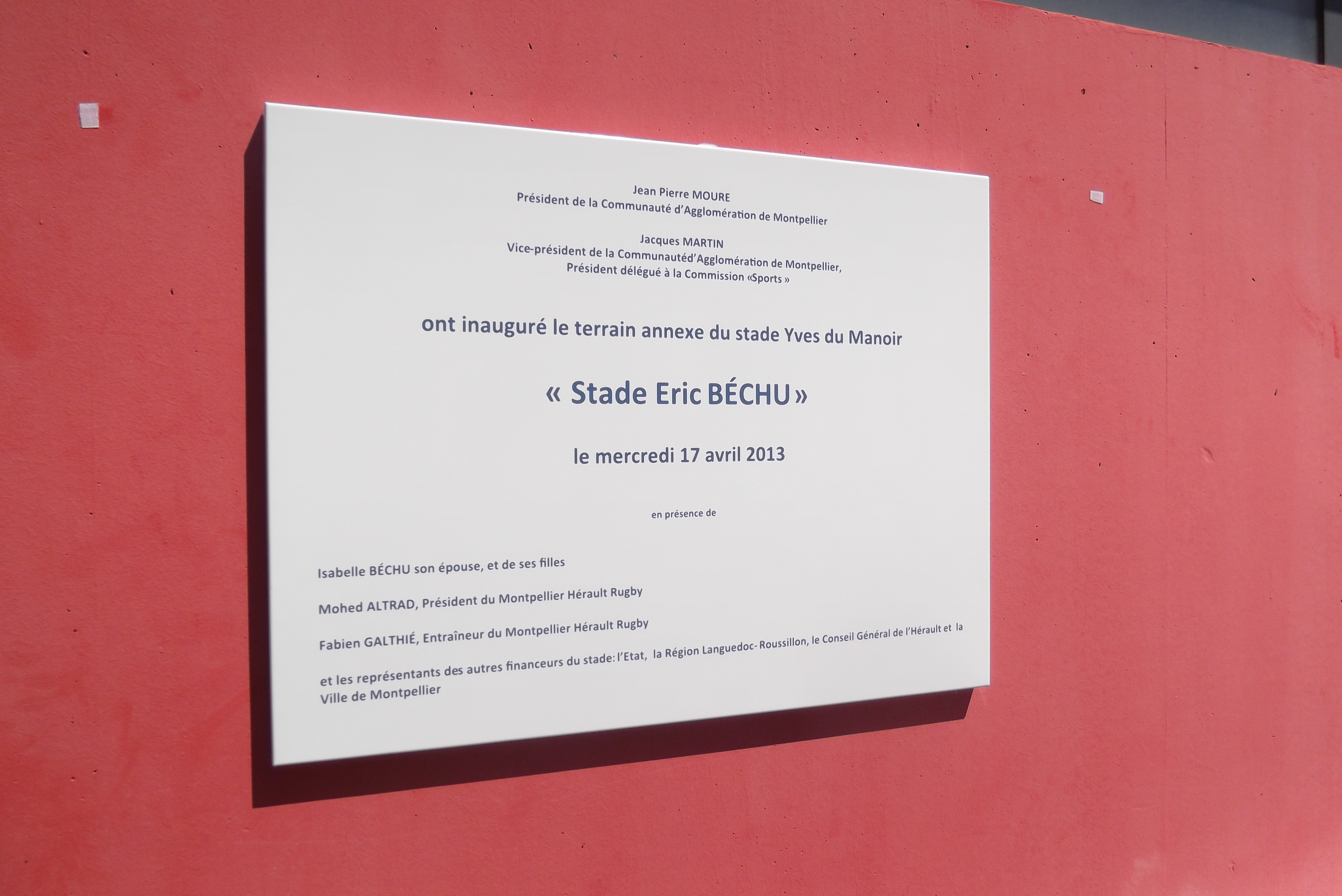 Plaque commémorative posée lors de l'inauguration du stade d' entraînement Éric Béchu (annexe du stade Yves du Manoir) le 17 avril 2013, en hommage à l'ancien entraîneur des avants, Éric Béchu.